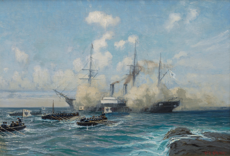 Ein Kriegsschiff unter der Flagge der preußischen Marine. Die Flagge stimmt nicht mit dem Titel Dampfsegler der kaiserlichen Flotte überein. Vermutlich handelt es sich um die als Gefecht bei Tres Forcas bekanntgewordene Landung am 7. August 1856. In diesem Falle ist das dargestellte Kriegsschiff die Korvette Danzig.